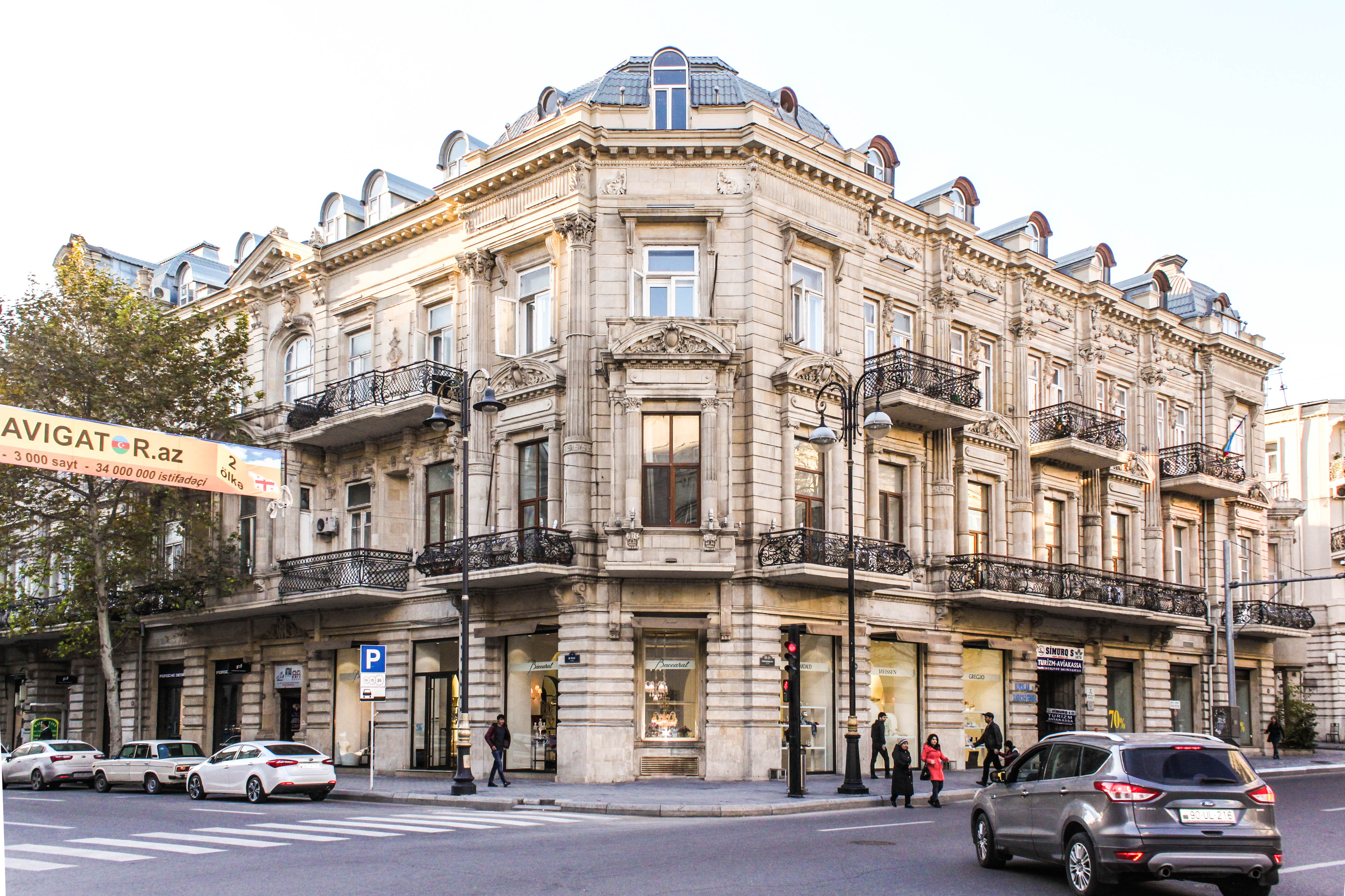 Yaşayış evi, 28 May küçəsi, 5